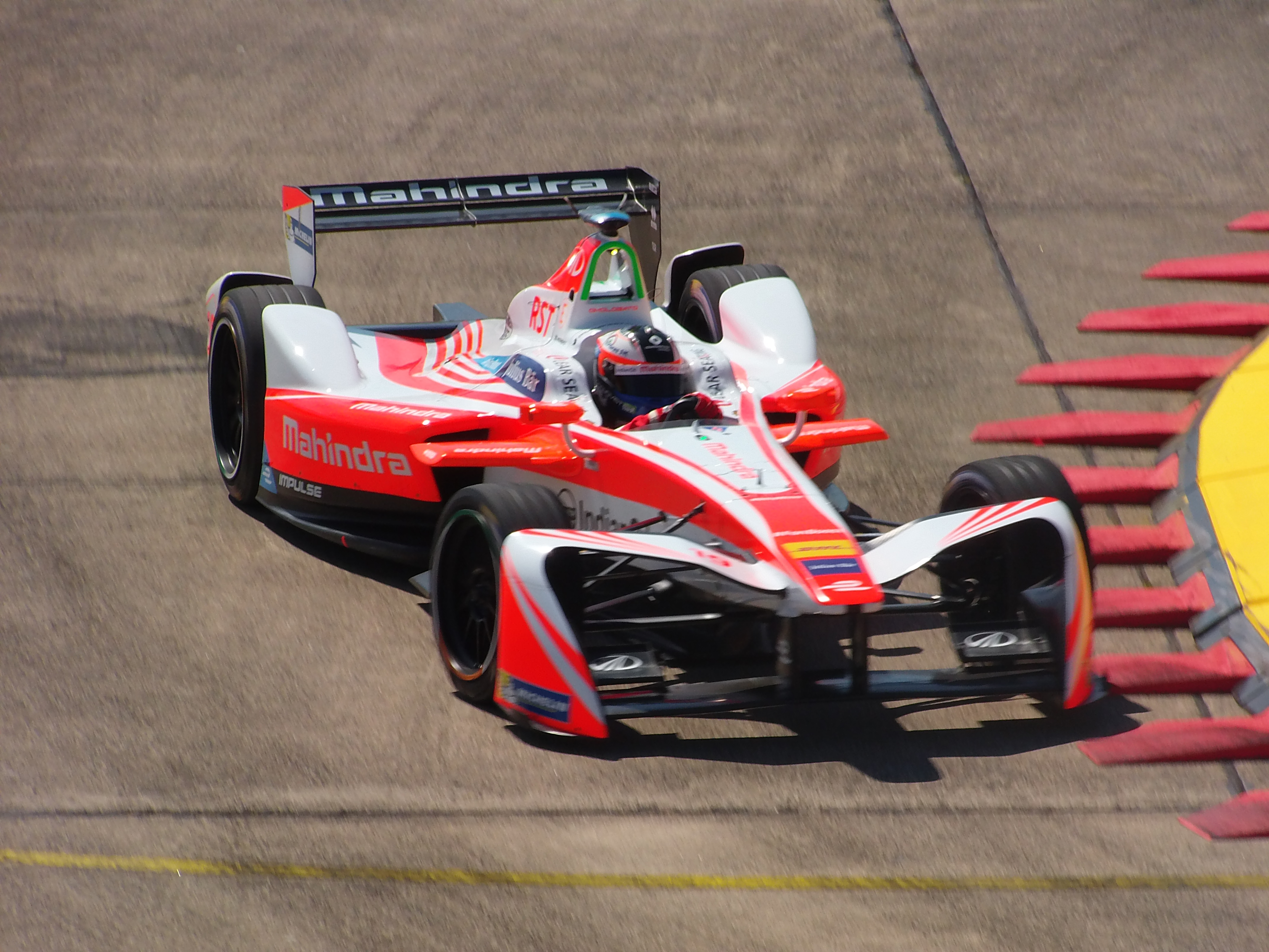 Felix Rosenqvist (Mahindra Racing) beim Berlin ePrix 2017